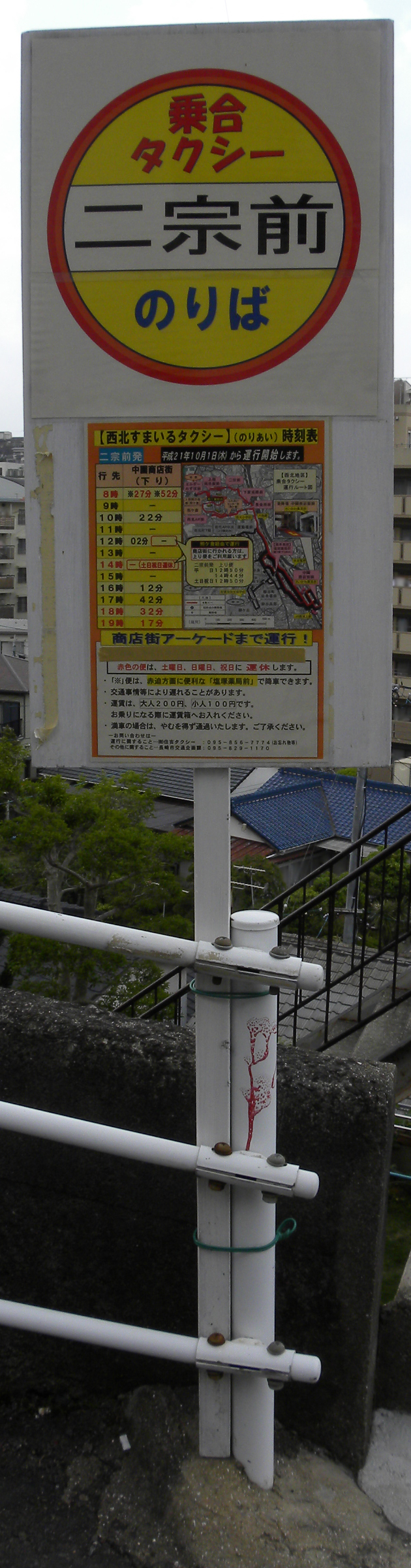 長崎市乗合タクシー 西北地区の停留所